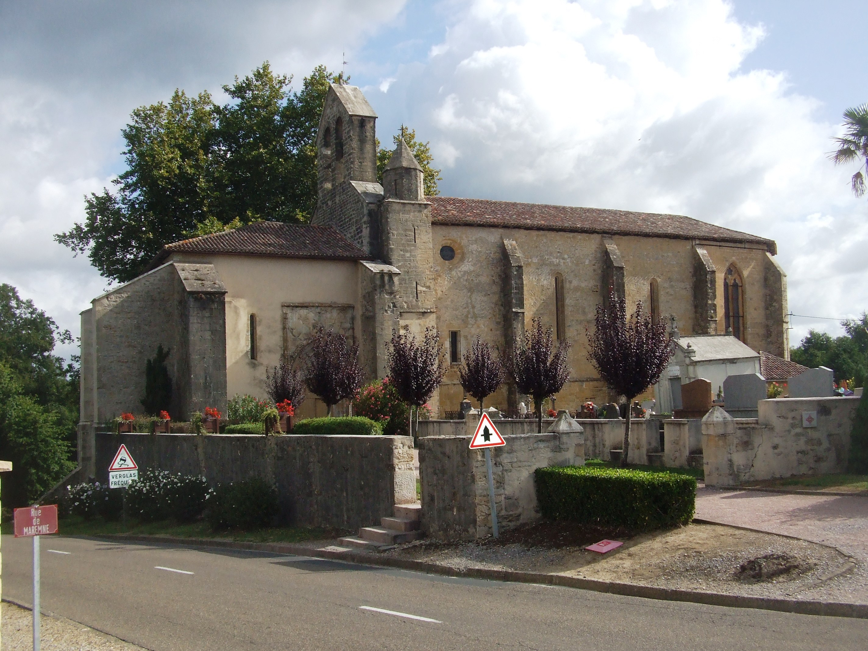 Église cimetériale de Saint-Martin-de-Hinx dans le département français des Landes, située sur la D12, route principale traversant le village.